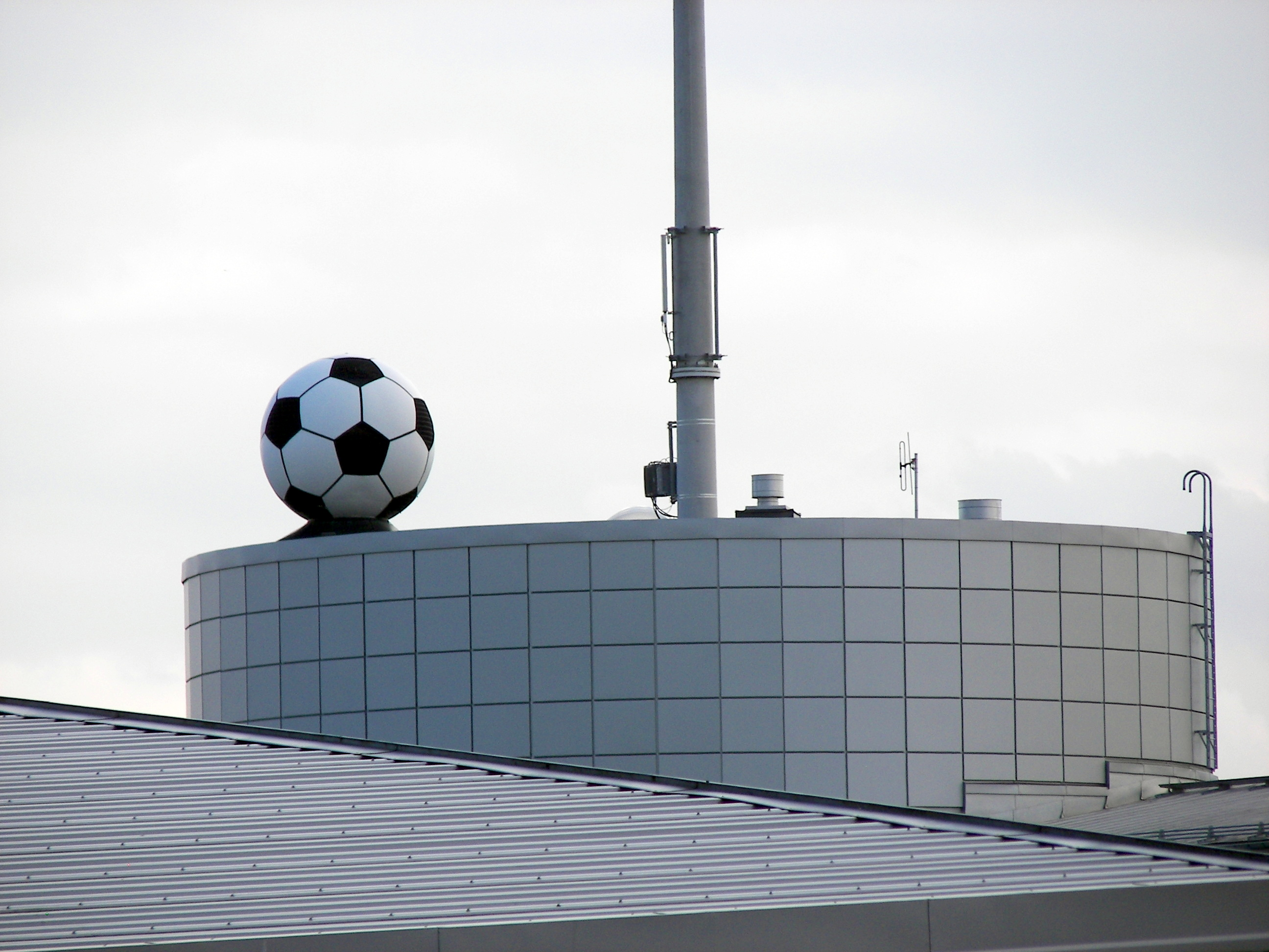 Fotbollen på Norrporten Arena i Sundsvall.